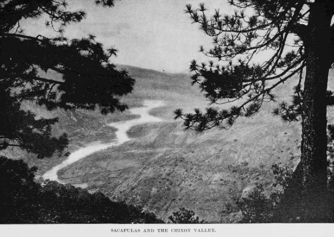 Grabado del libro Guatemala, the land of quetzal de William T. Brigham, publicado en 1887. Sacapulas y el valle del río Chixoy en 1884.